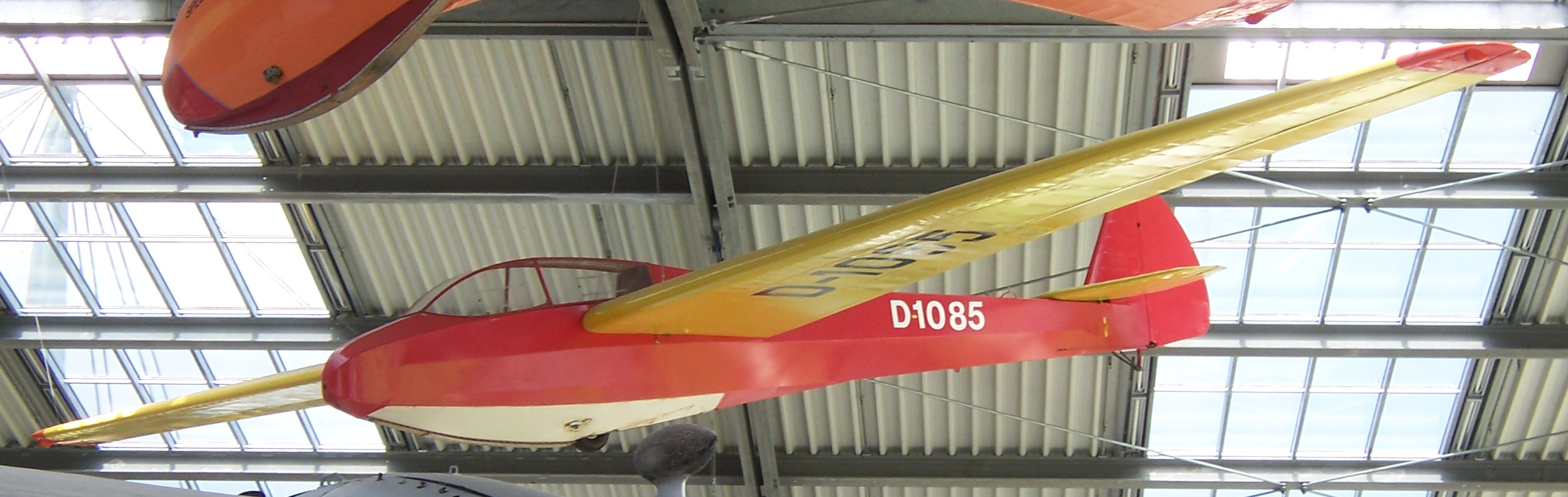 Scheibe Mü 13 E Bergfalke in der Flugwerft Schleißheim